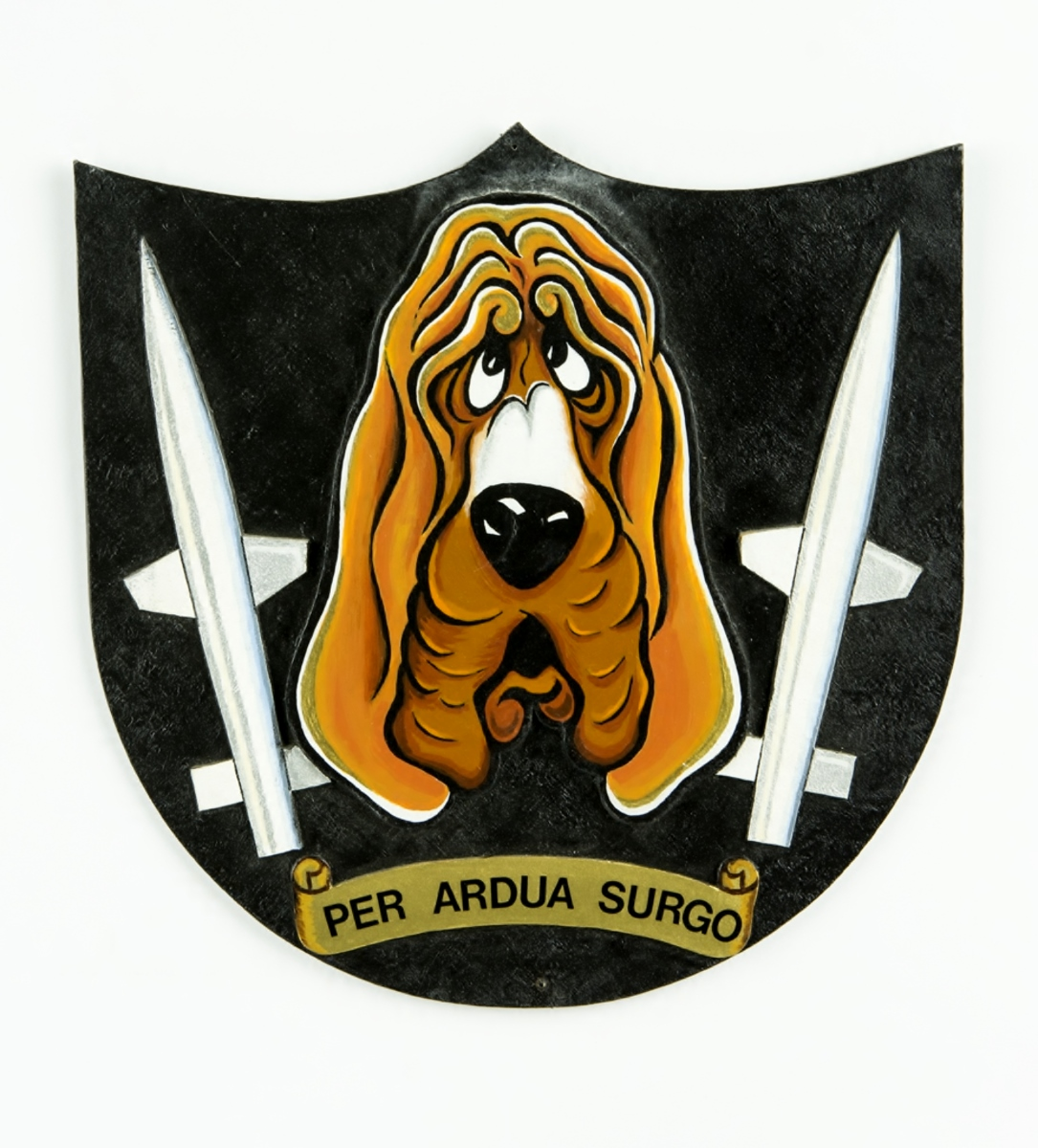 Creative Commons CC-by Flygvapenmuseum / Lars Ekelund. År 1966 beväpnades F 10 med luftvärnsroboten Bloodhound. En division sattes upp och divisionsmärket användes ända till 1974 då divisionen upplöstes. "Per Ardua Surgo" betyder "Genom svårigheterna reser jag mig".